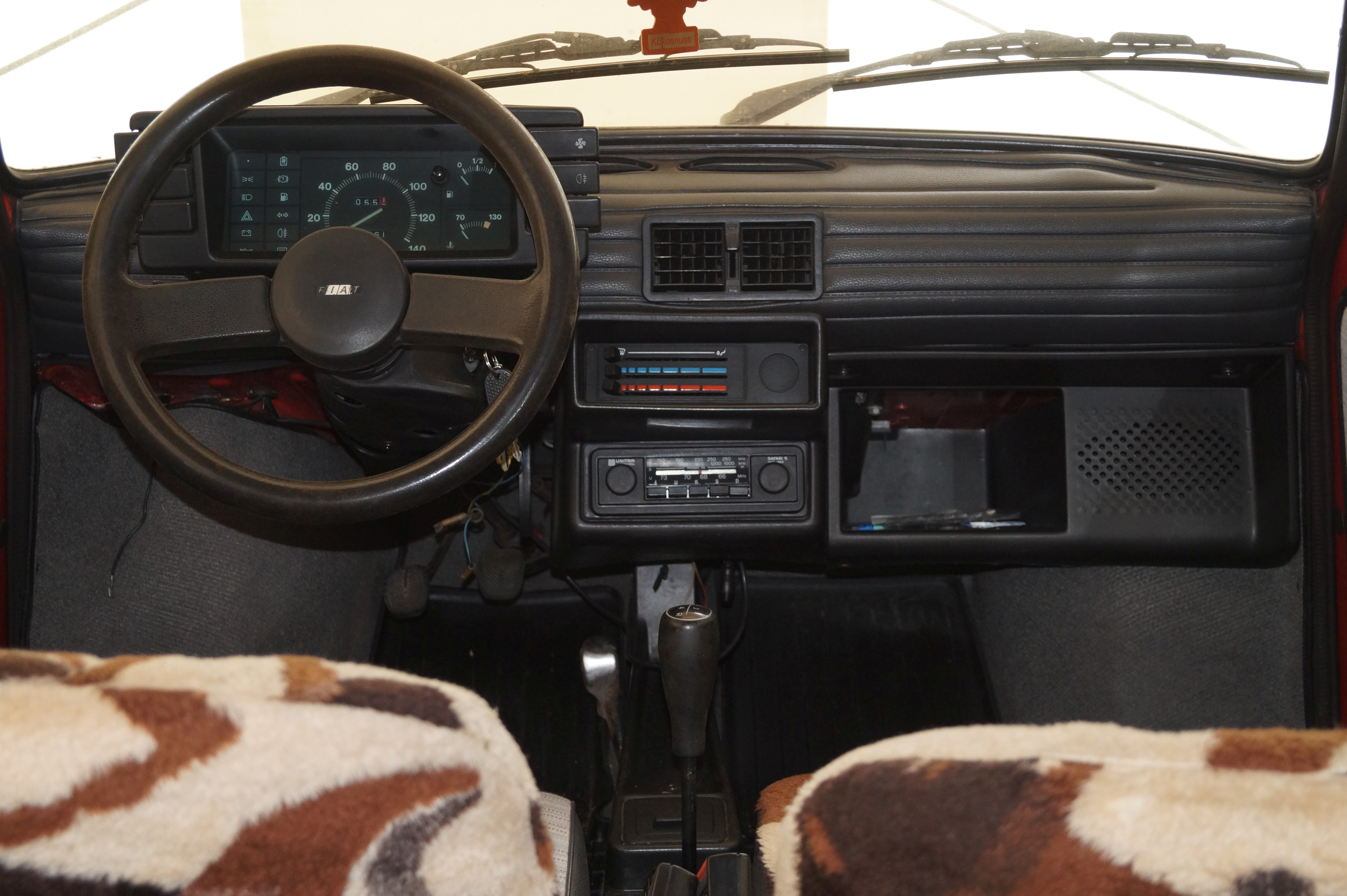 The making of this document was supported by Wikimedia Polska Association, within Wikigrant no. WG 2016-18. Wnętrze Polskiego Fiata 126 BIS w Muzeum w Nieborowie